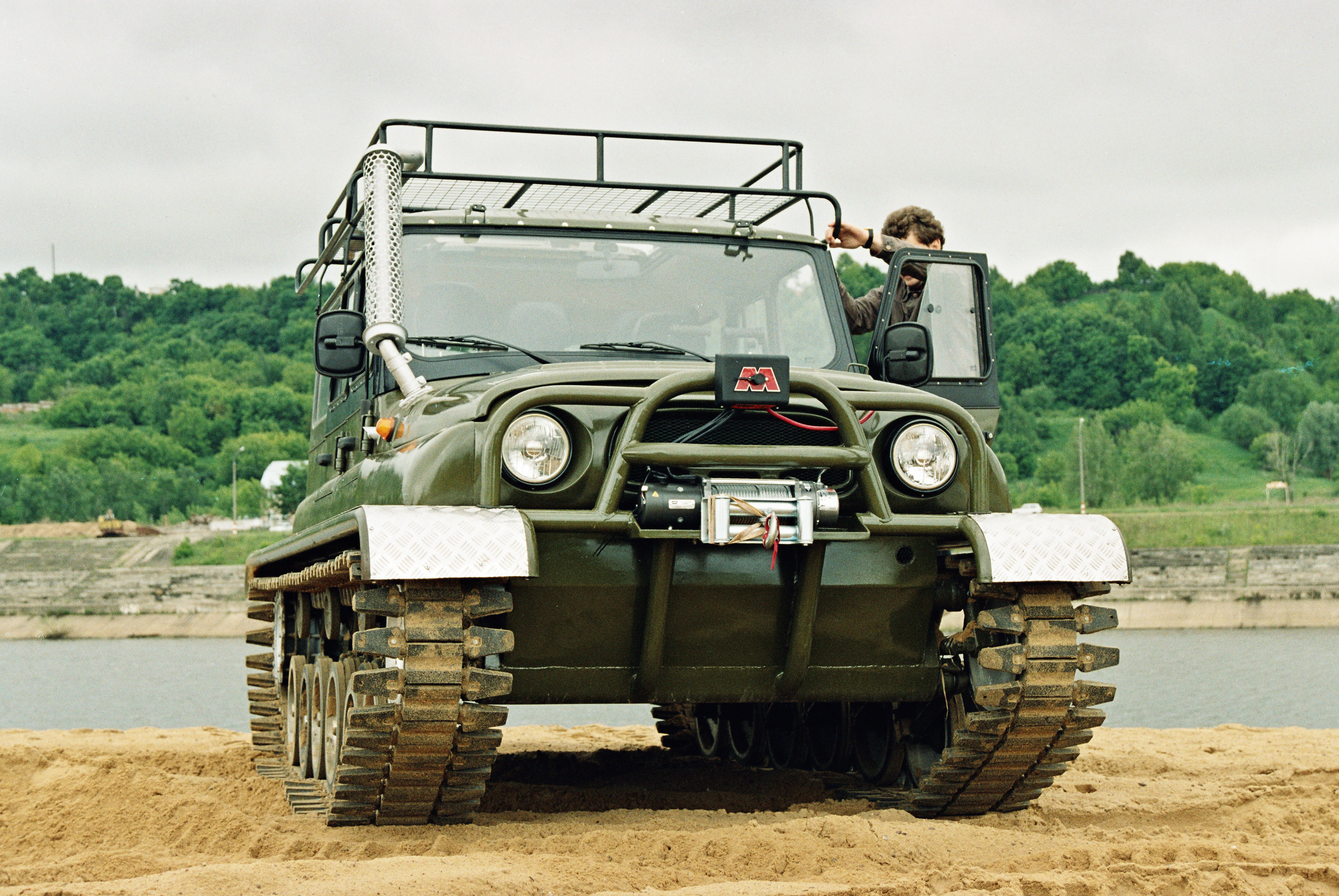 ЗВМ-2410 «Ухтыш»